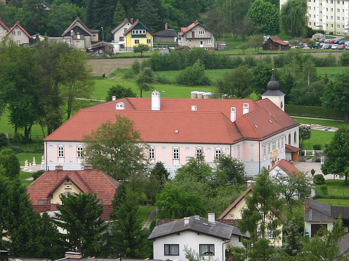 Pitten Pfarrhof (Bild 1)